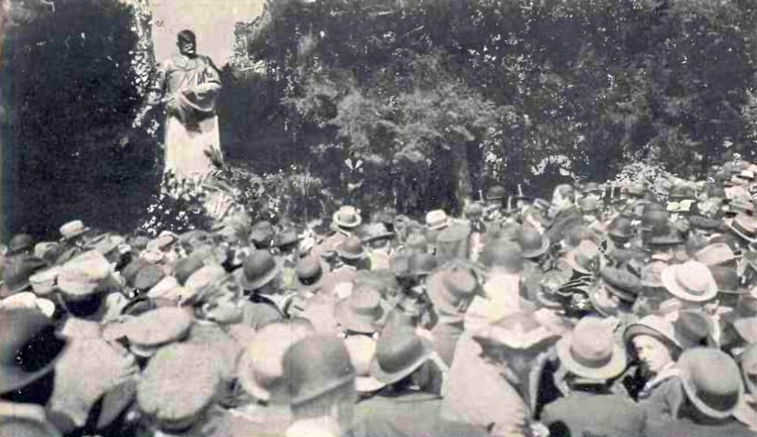 Dezvelirea bustului lui Gheorghe Panu din Cișmigiu - 1915